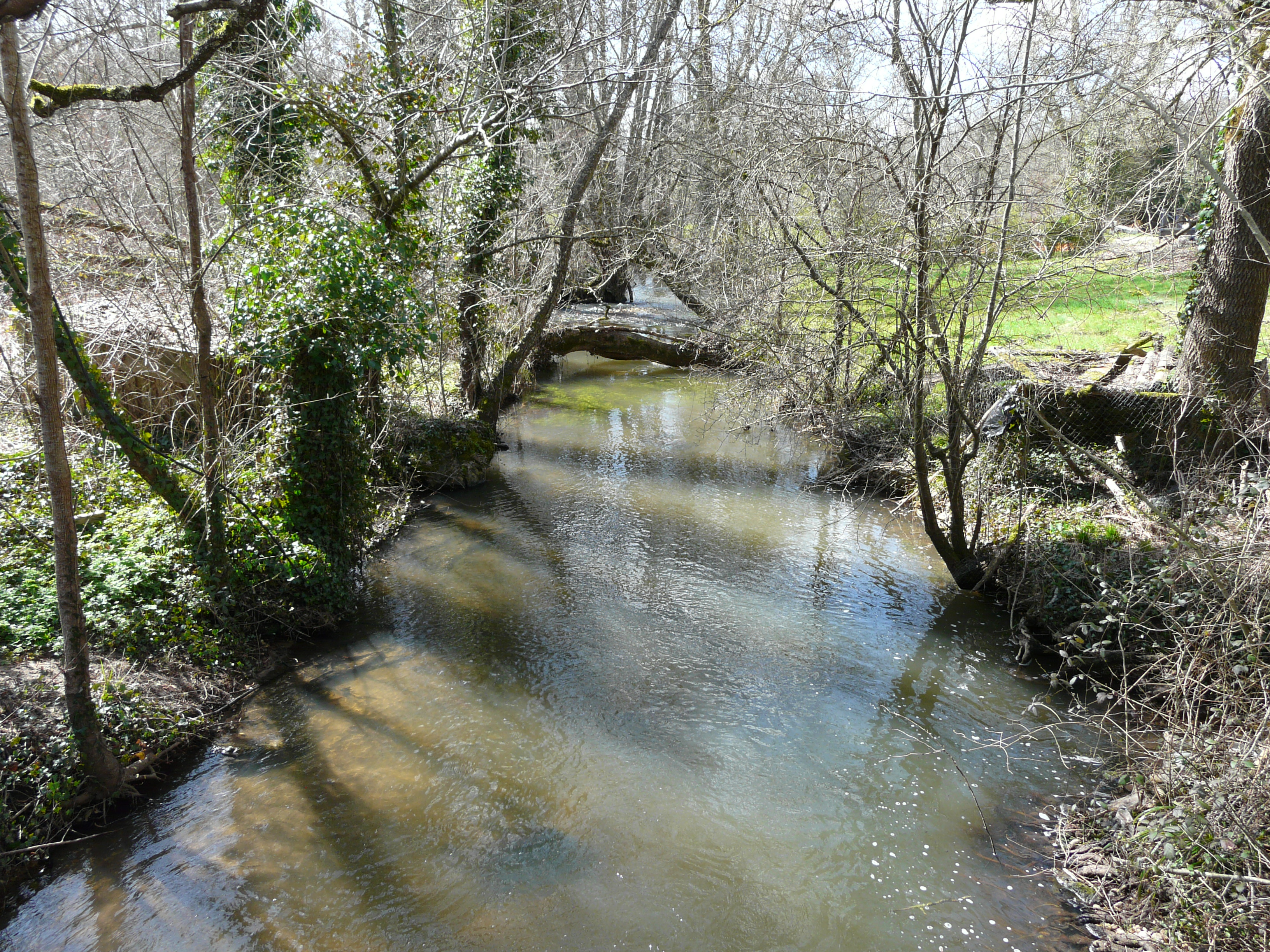 La Beauronne au lieu-dit les Planches, entre Douzillac (à gauche) et Saint-Jean-d'Ataux (à droite), Dordogne, France. Vue prise en direction de l'aval.